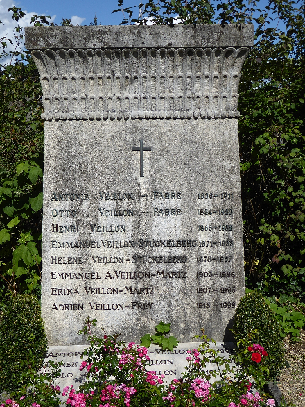 Henry Veillon (1865–1932) Physiker, Uni Professor. Grab auf dem Friedhof Wolfgottesacker, Basel